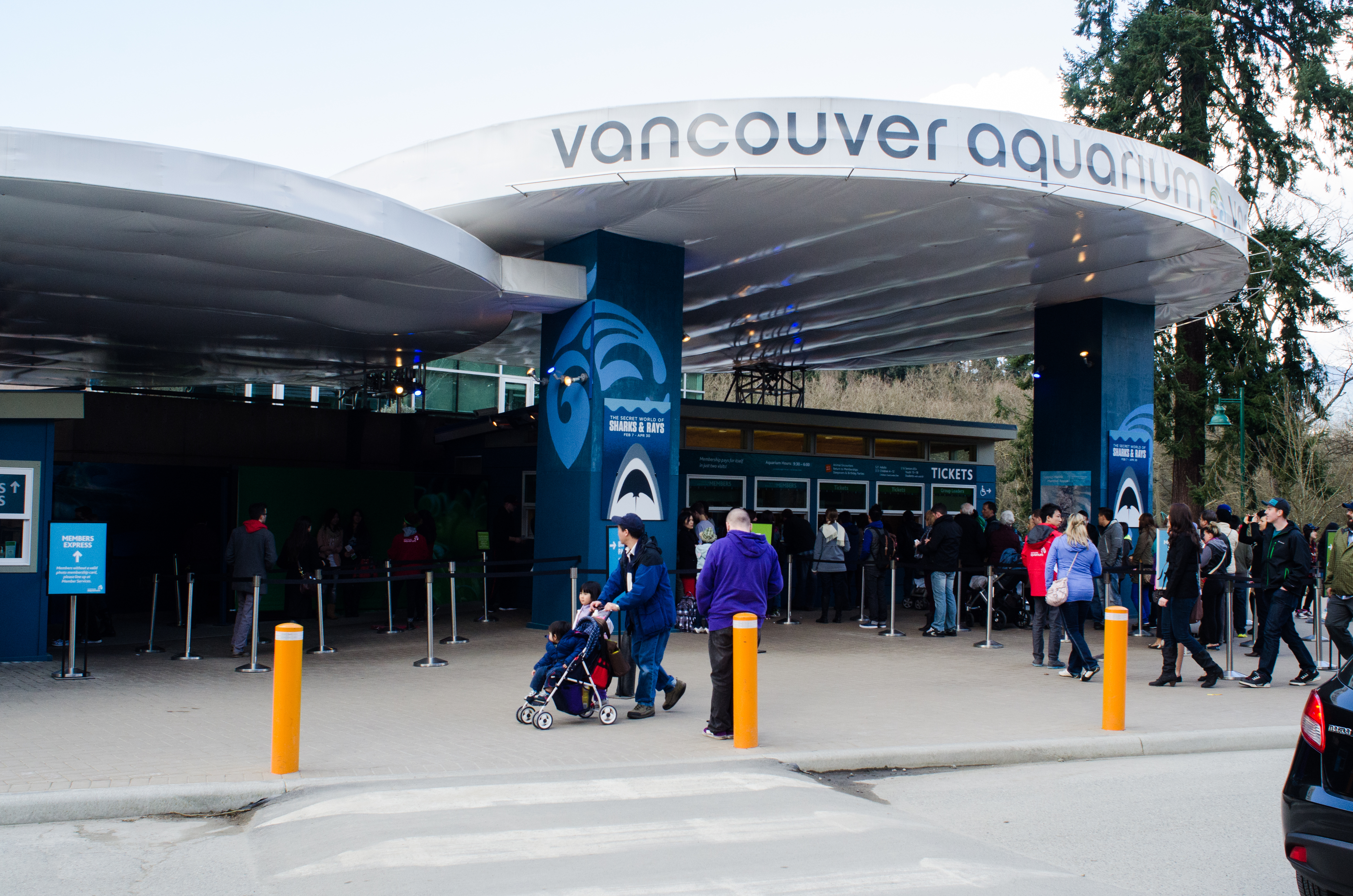 Vancouver Aquarium